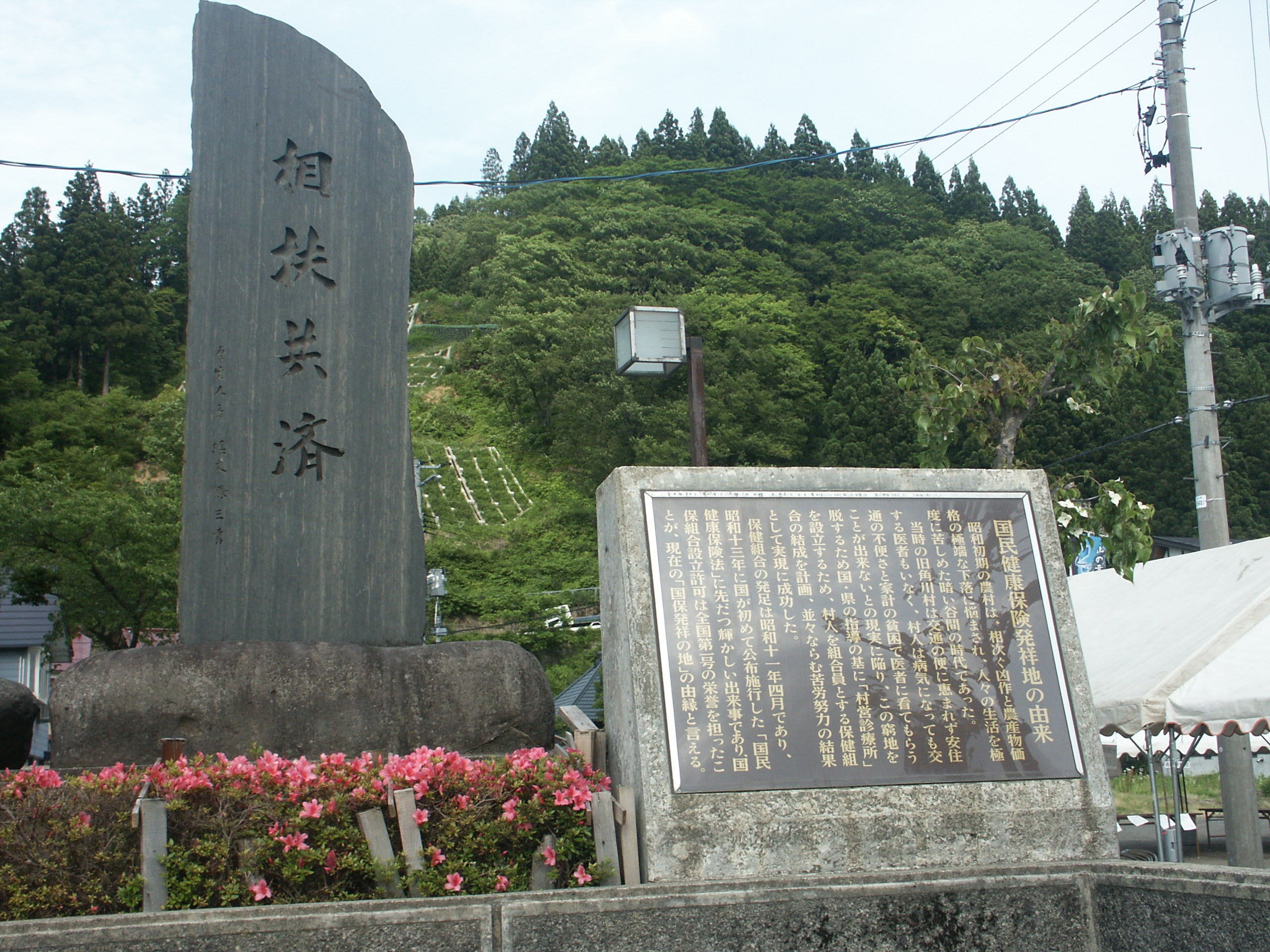 山形県戸沢村農村環境改善センターに建立されている国民健康保険発祥の地の碑と由来板